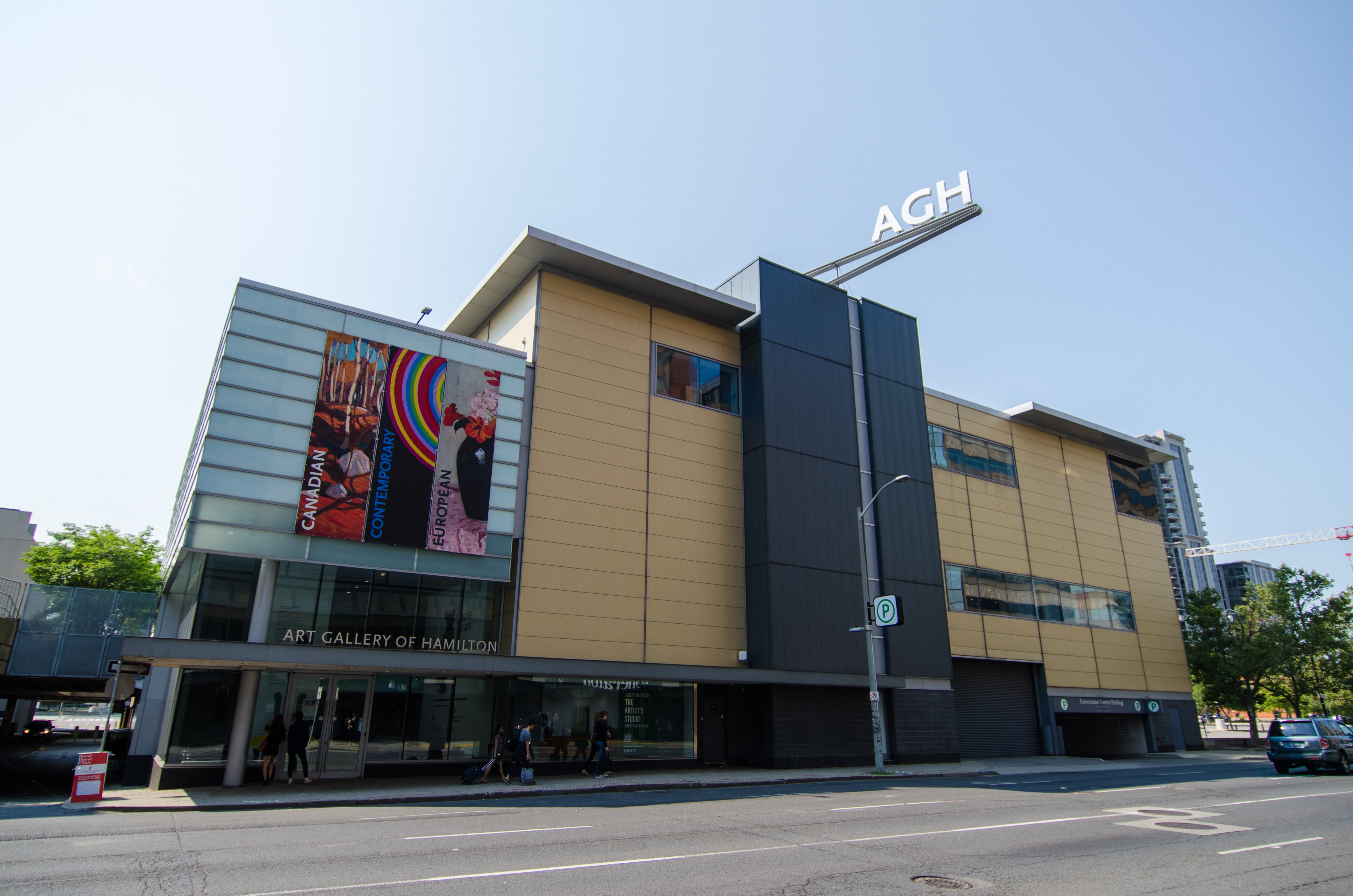 Seen in Dark Matter episode #108.